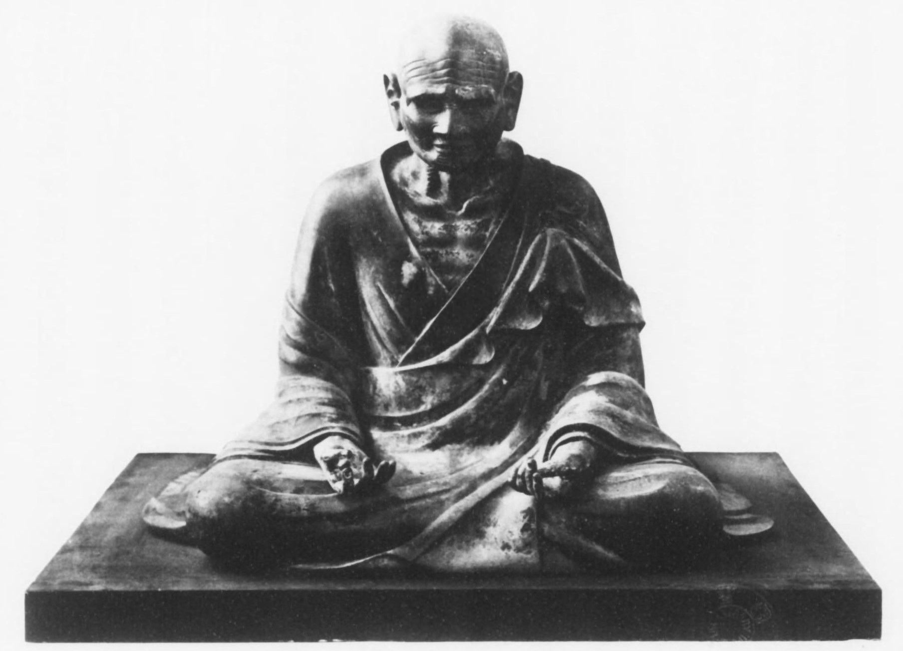 法隆寺所蔵（経蔵安置）・木造伝勧勒僧正坐像（重要文化財）。平安時代の作。